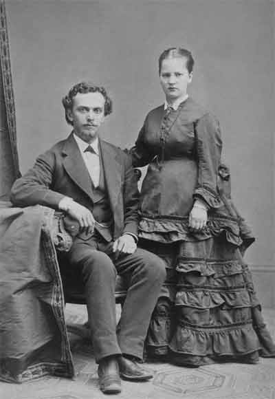 Александр и Зинаида Бари, Филадельфия, 1870-е гг.